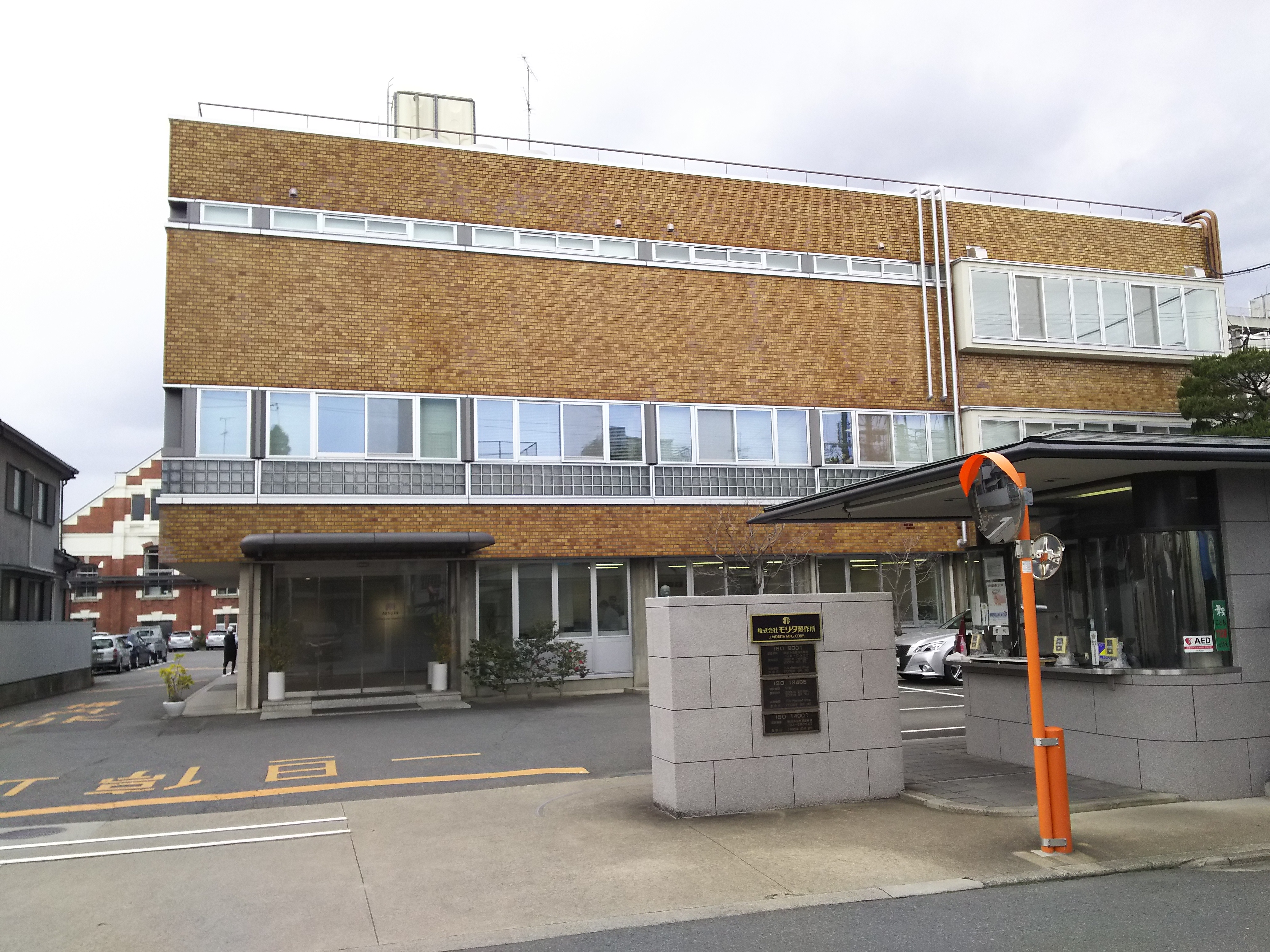 モリタ製作所本社（京都市伏見区）